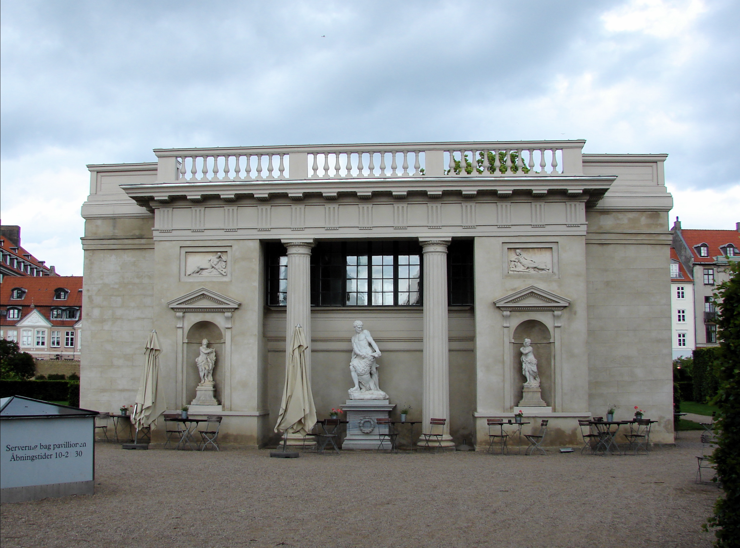 Herkulespavillonen i Kongens Have, Caspar Frederik (Friedrich) Harsdorff (1735-99), København